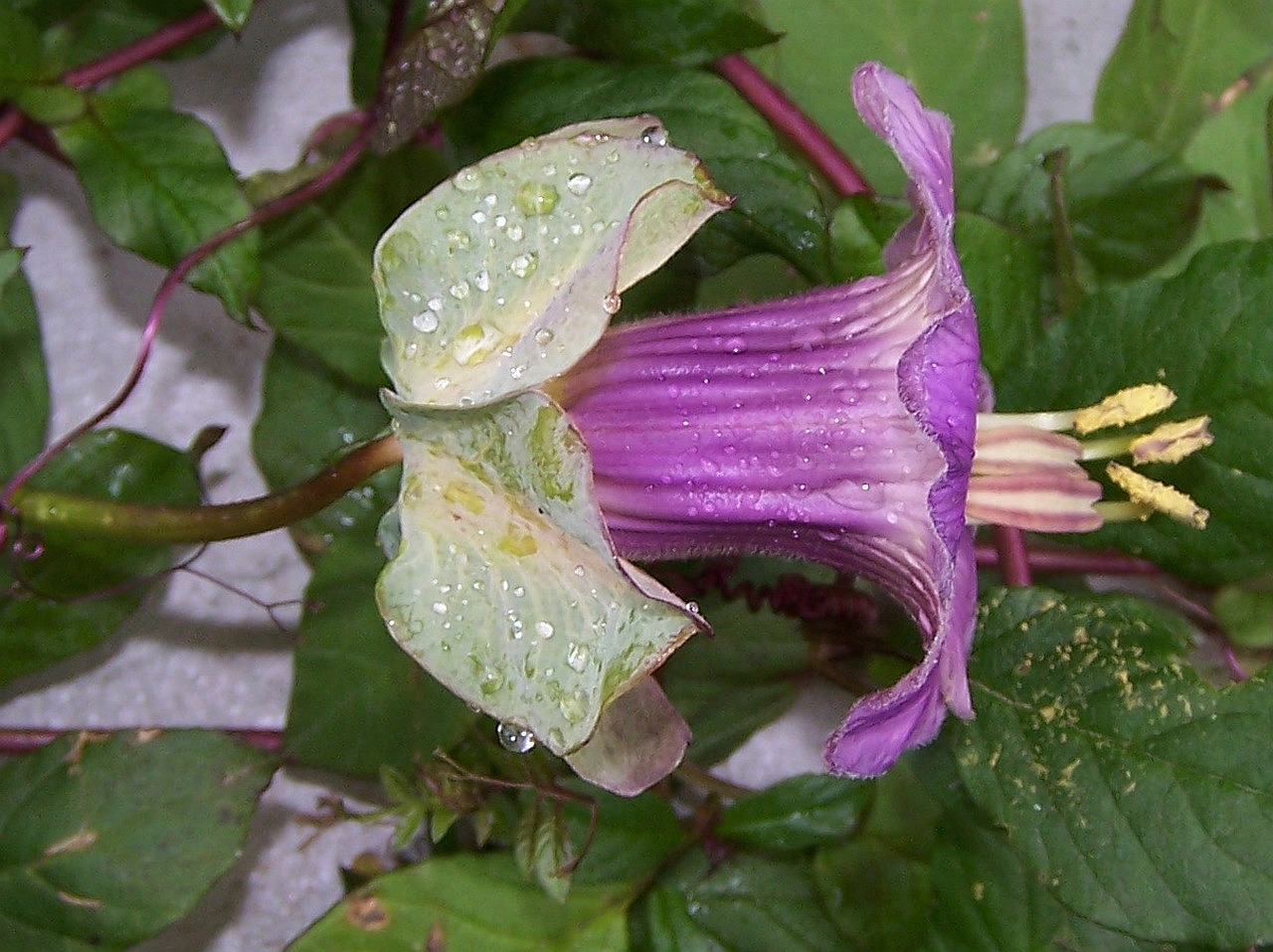 Cobaea scandens